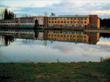 Jokela school